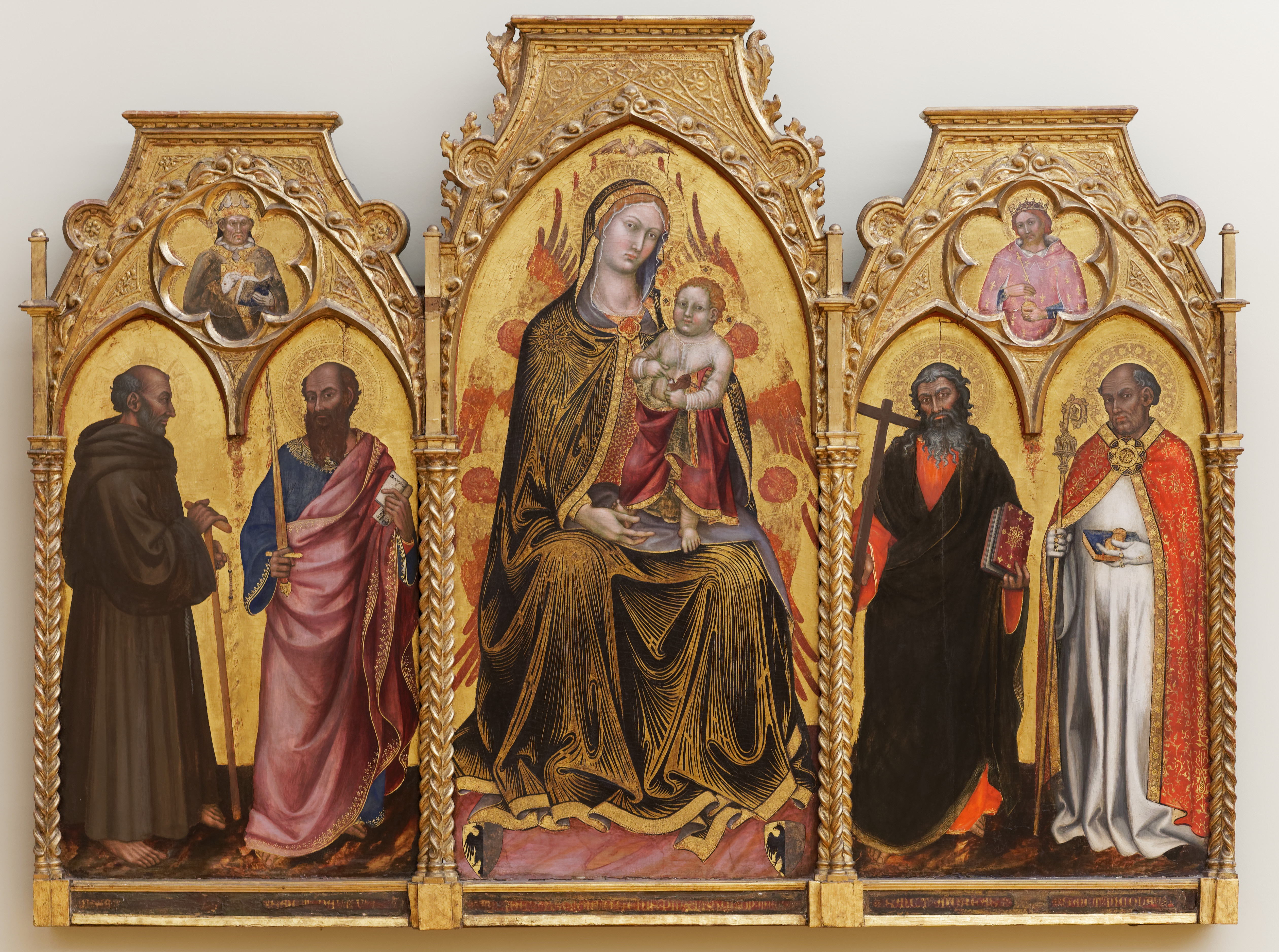 Vierge à l'Enfant entre saint Gérard, saint Paul, saint André et saint Nicolas, tableau de Taddeo di Bartolo conservé au musée de Grenoble